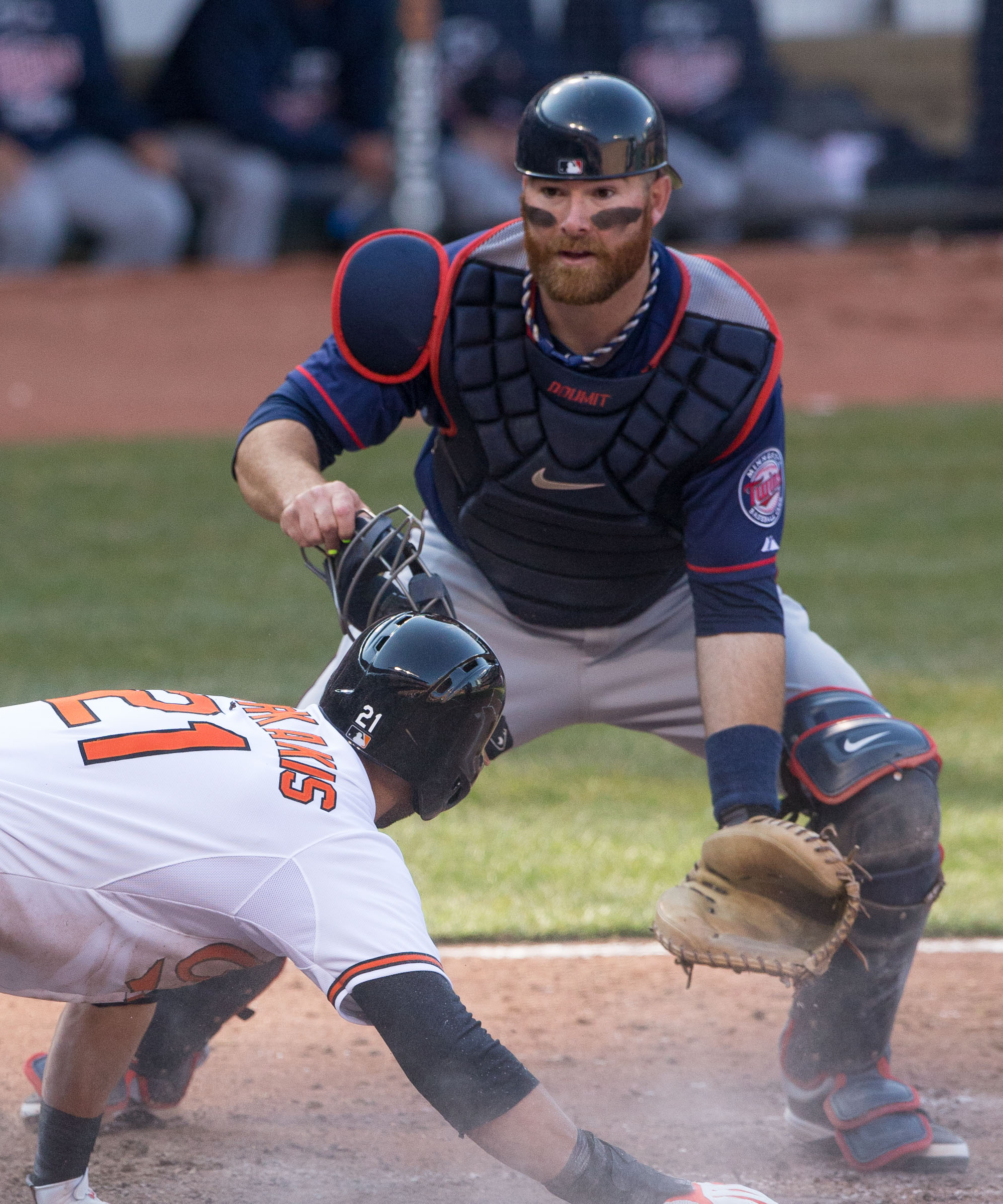 Ryan Doumit